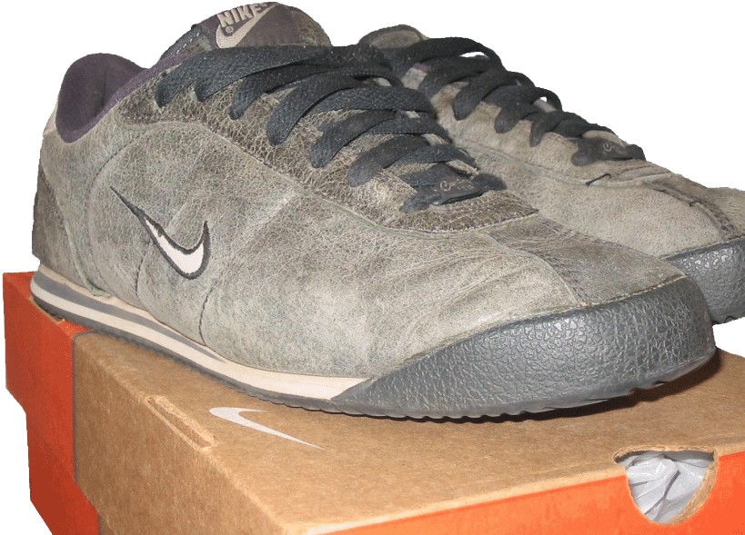 Nike Cortez 'TB trainers.